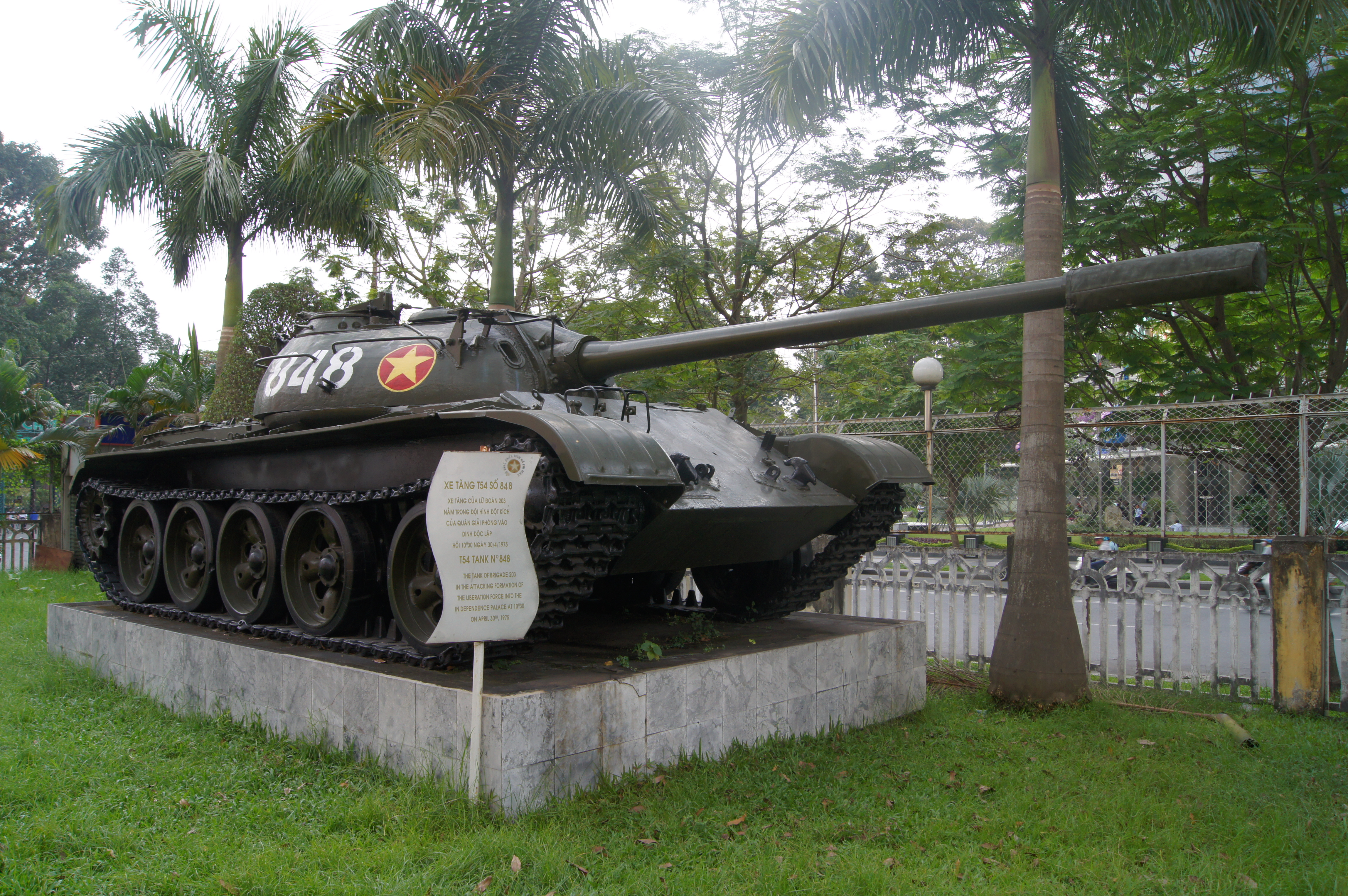 1975年4月30日のサイゴン陥落（ベトナム戦争）にて、統一会堂に突入したja:T-54戦車。 （ホーチミン作戦博物館にて撮影）